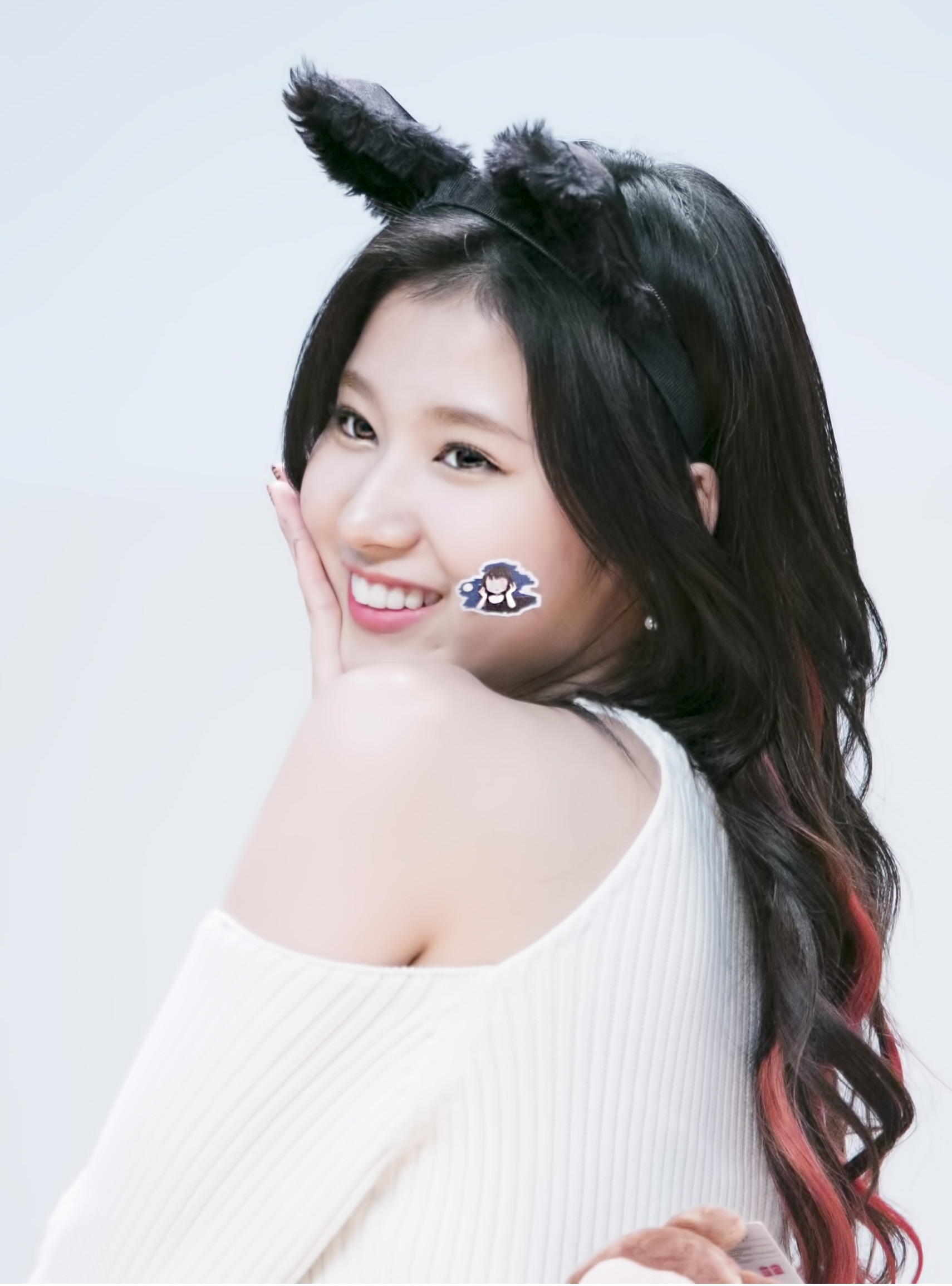 161113 청량리 팬싸인회 사나 1pic